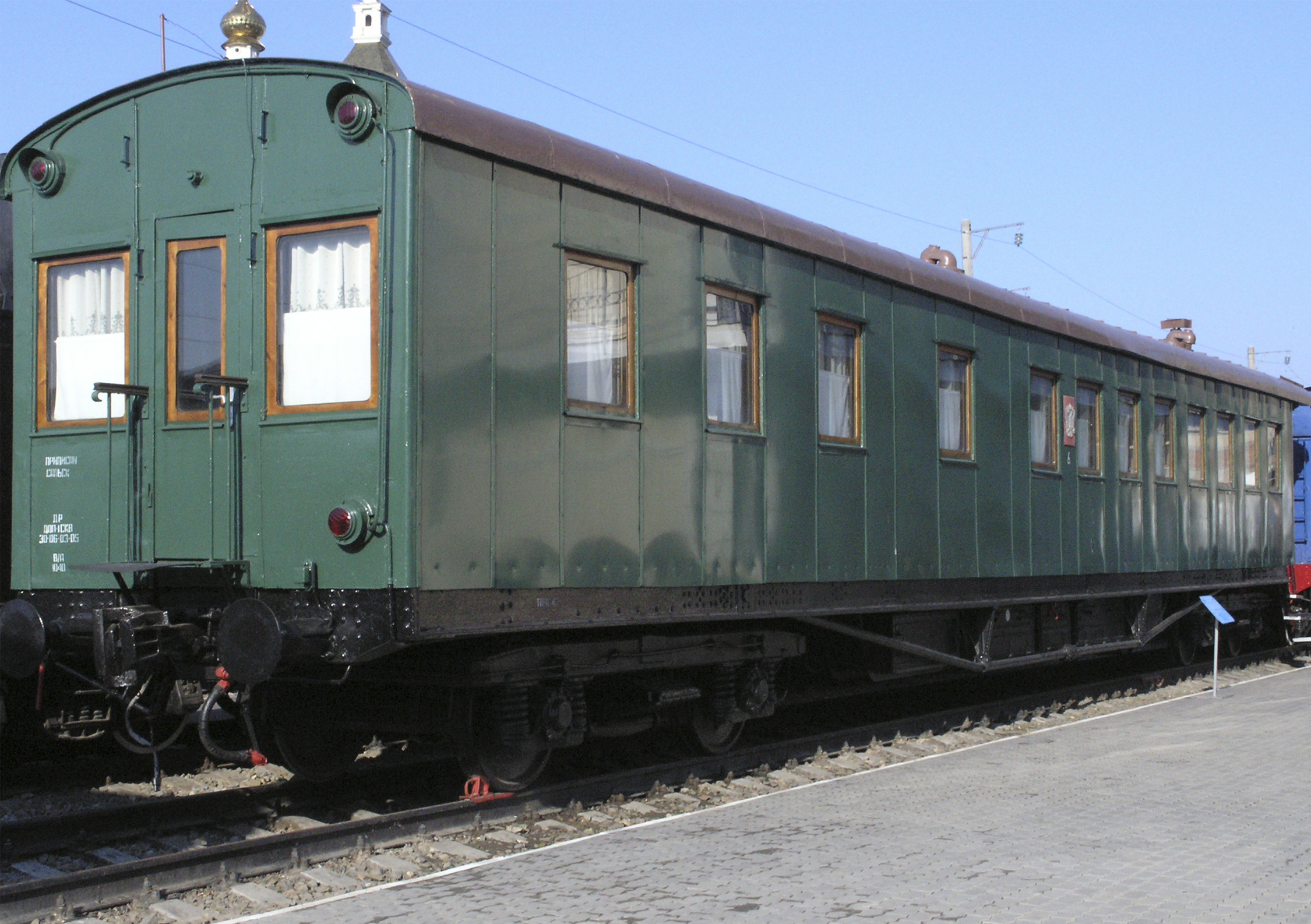 По сохранившимся документам вагон построен в 1911 году